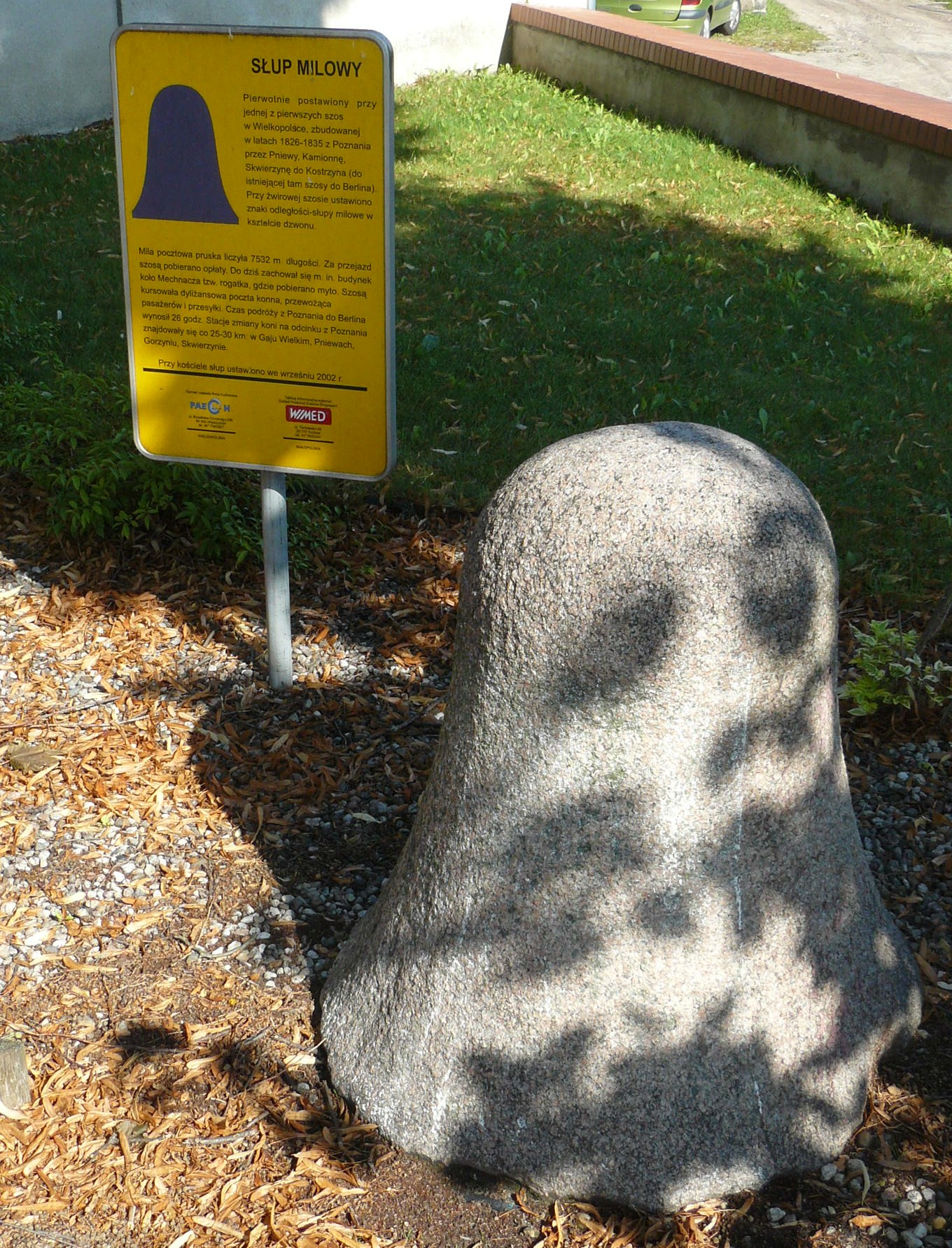 Słup milowy w Kamionnej.